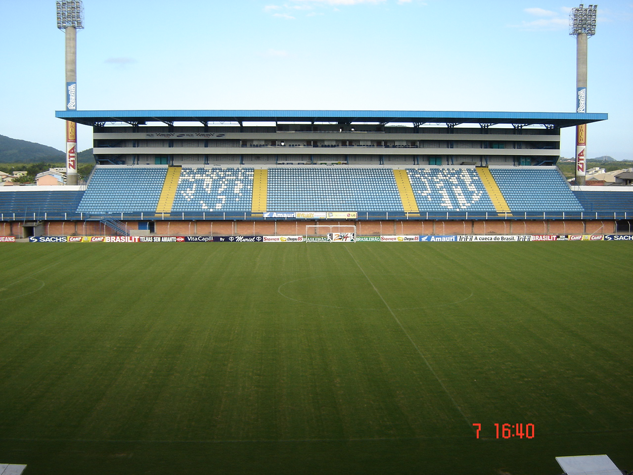 Estádio da Ressacada